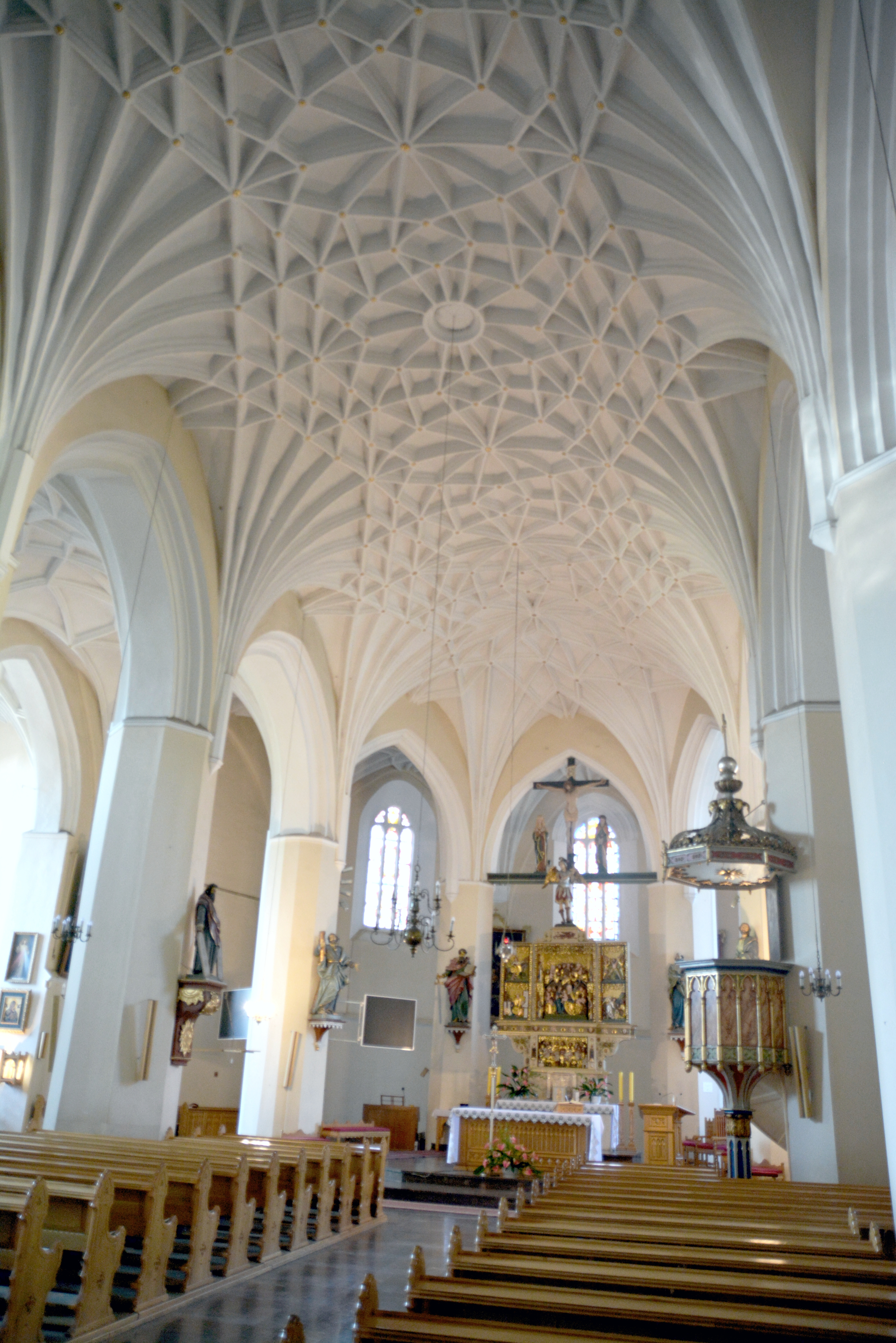 Kościół p.w. św. Michała Archanioła w Świebodzinie